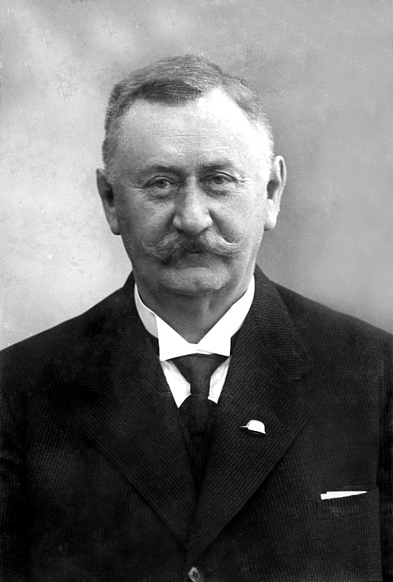 Arnošt Herman (1871–1940)